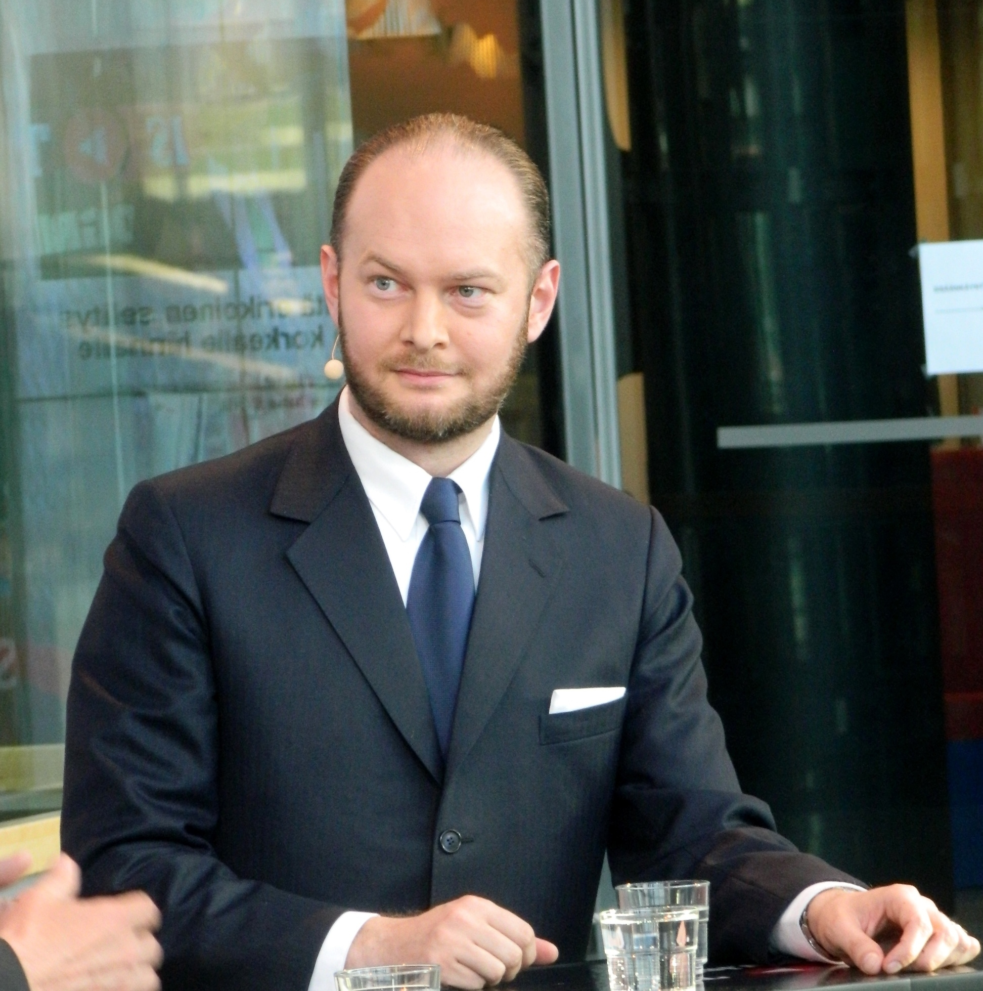 Perussuomalaisten europarlaamentaarikko Sampo Terho Ilta-Sanomien eurovaali väittlyssä Sanomatalolla 15.5.2014.